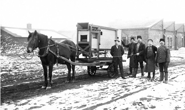 Threshing machine from Thermaenius Mekaniska Verkstad (Sweden) in transport